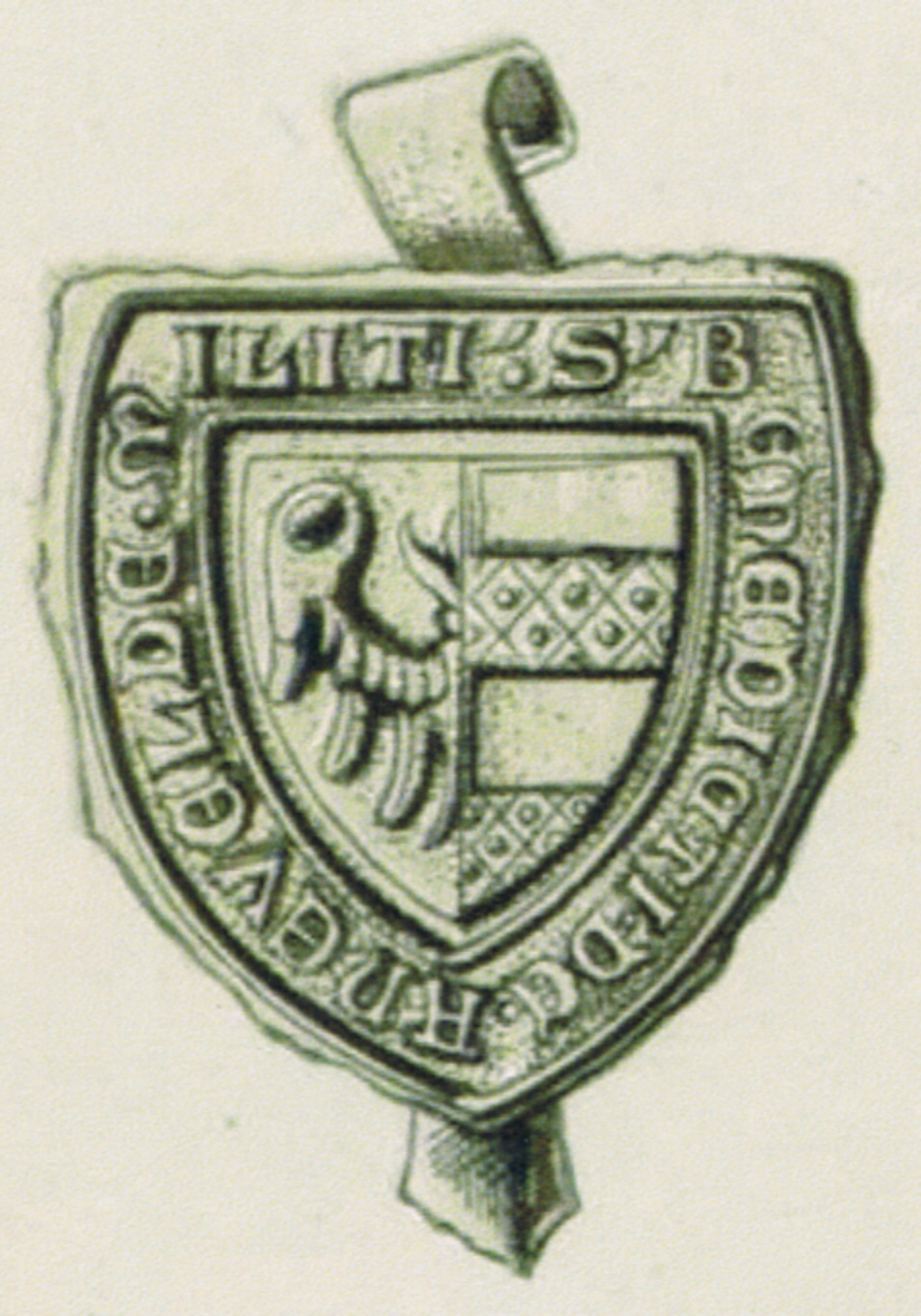 Siegel des Ritter Benedict von Ahlefeldt